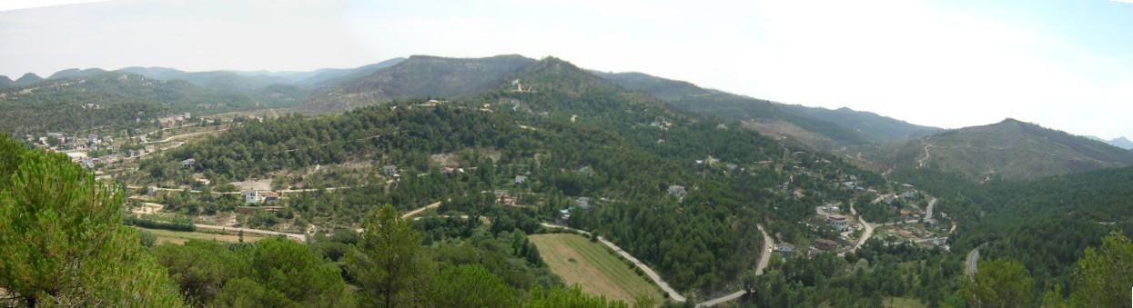 La Urbanització Masia del Solà (Monistrol de Calders, Moianès)